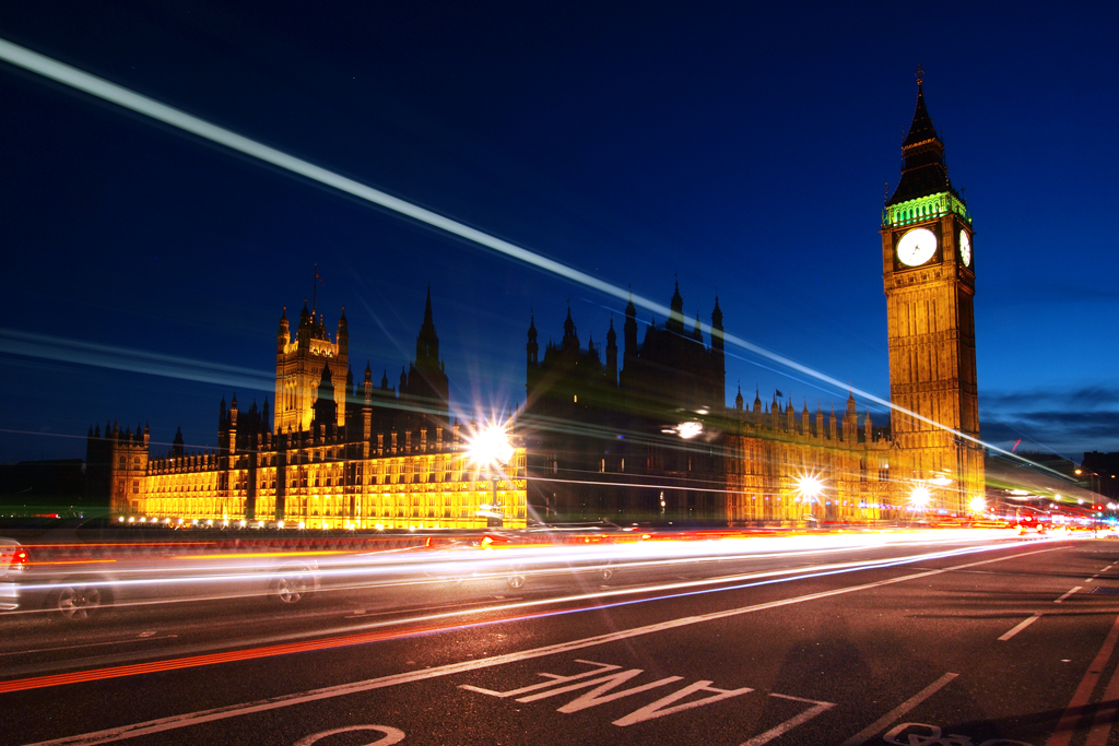 Big Ben and Westminster Palace after sunset.